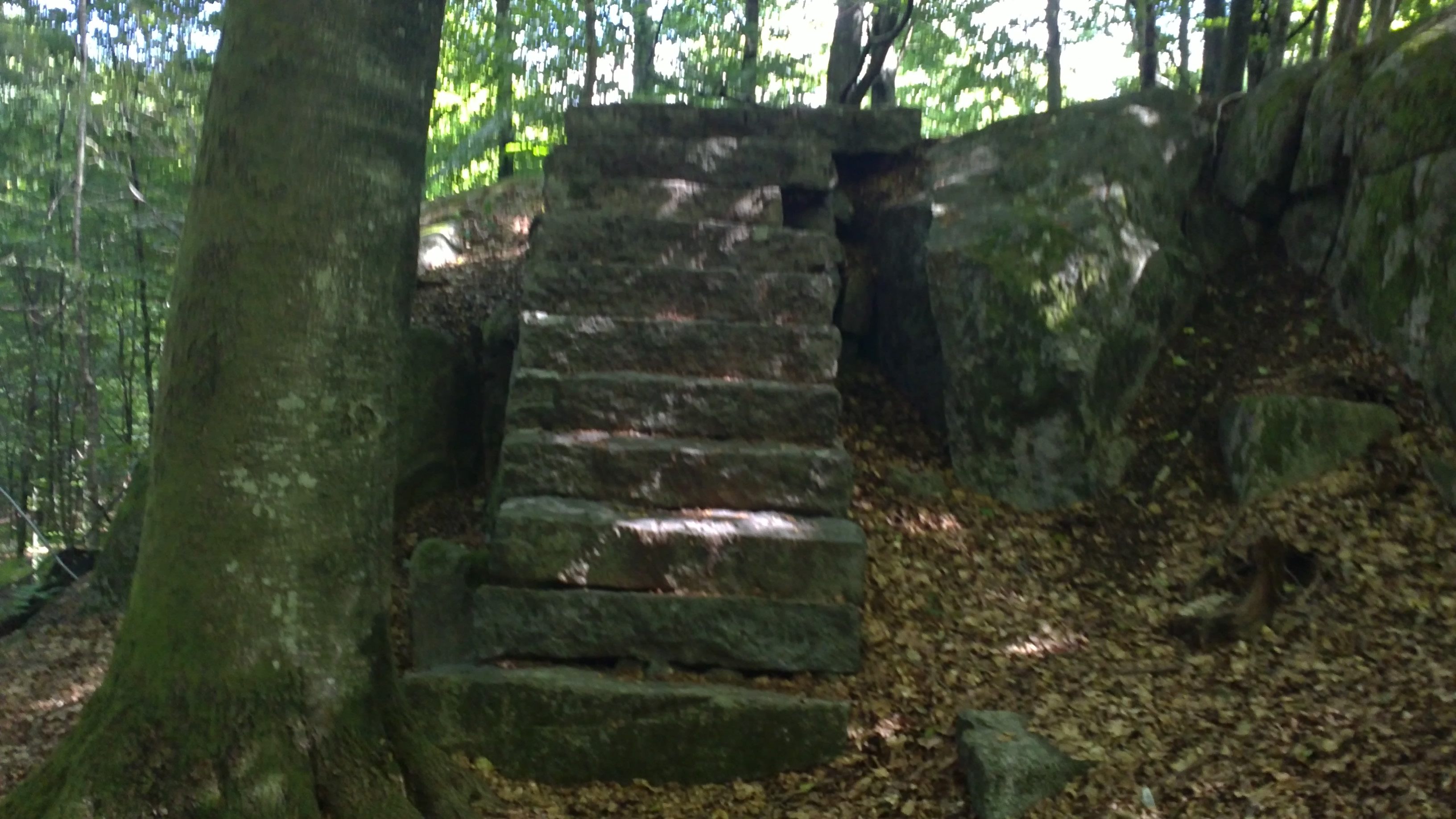 Bilde av steintrappa i Bøkeskogen